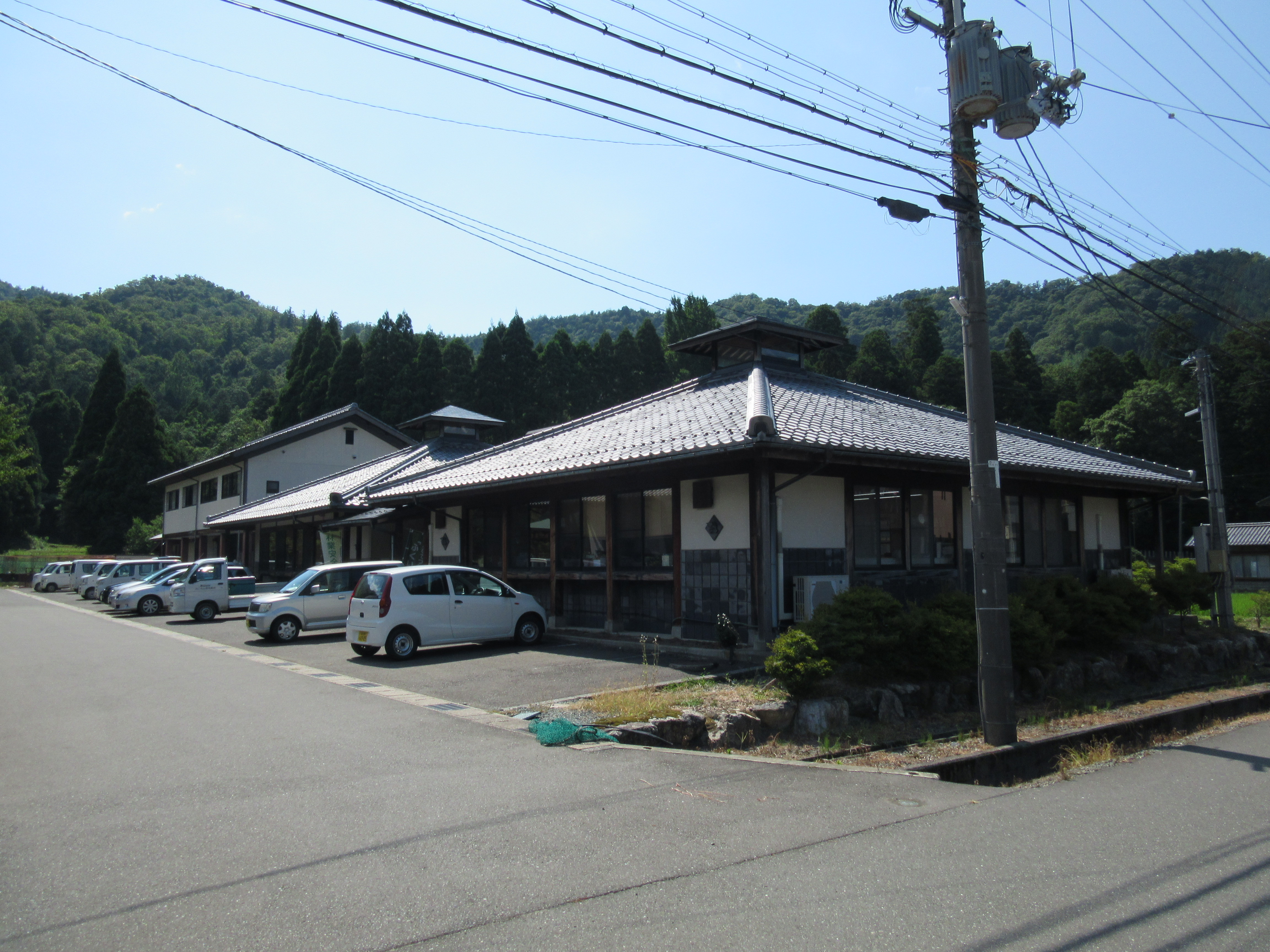 れいなん森林組合